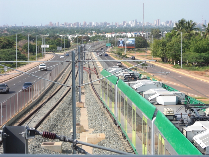 Vías del metro de Maracaibo.